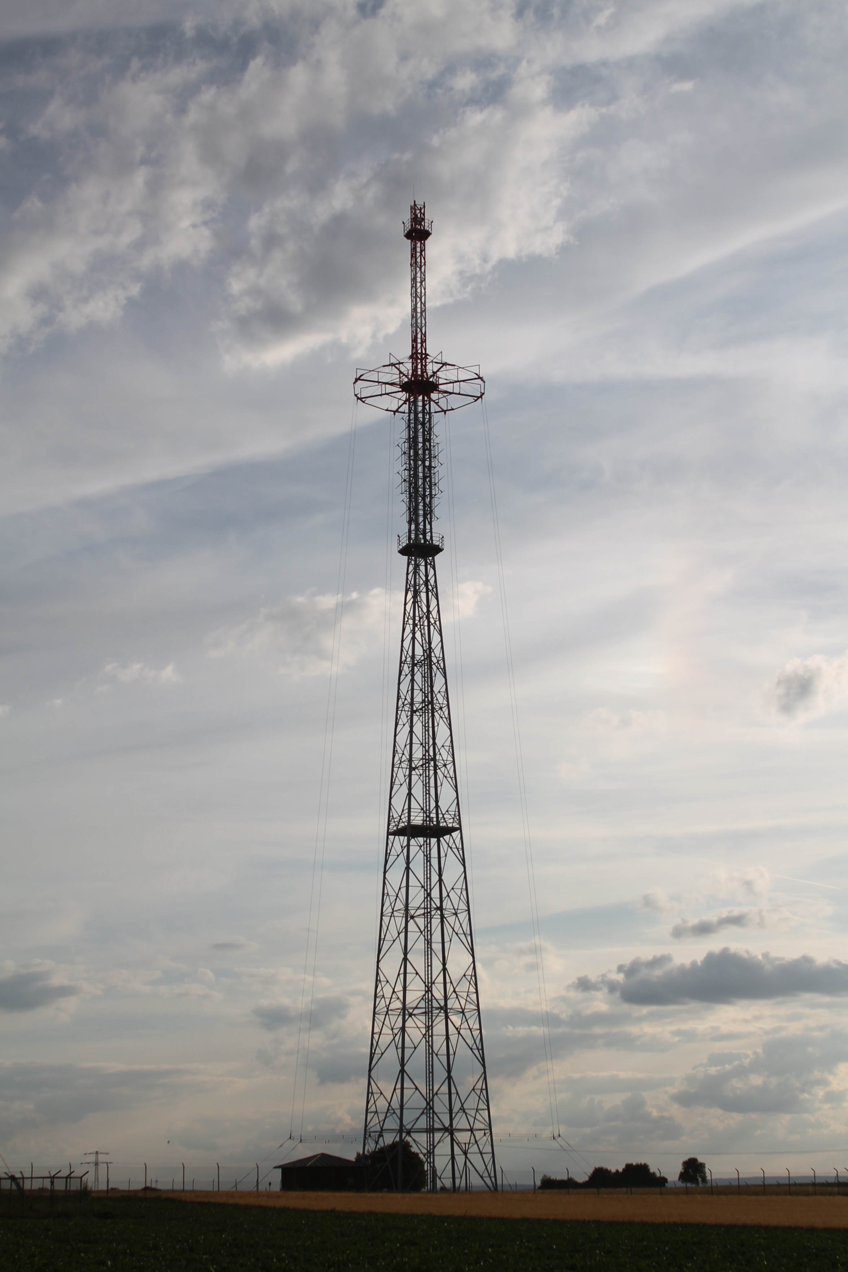 Sendeturm des Rheinsenders